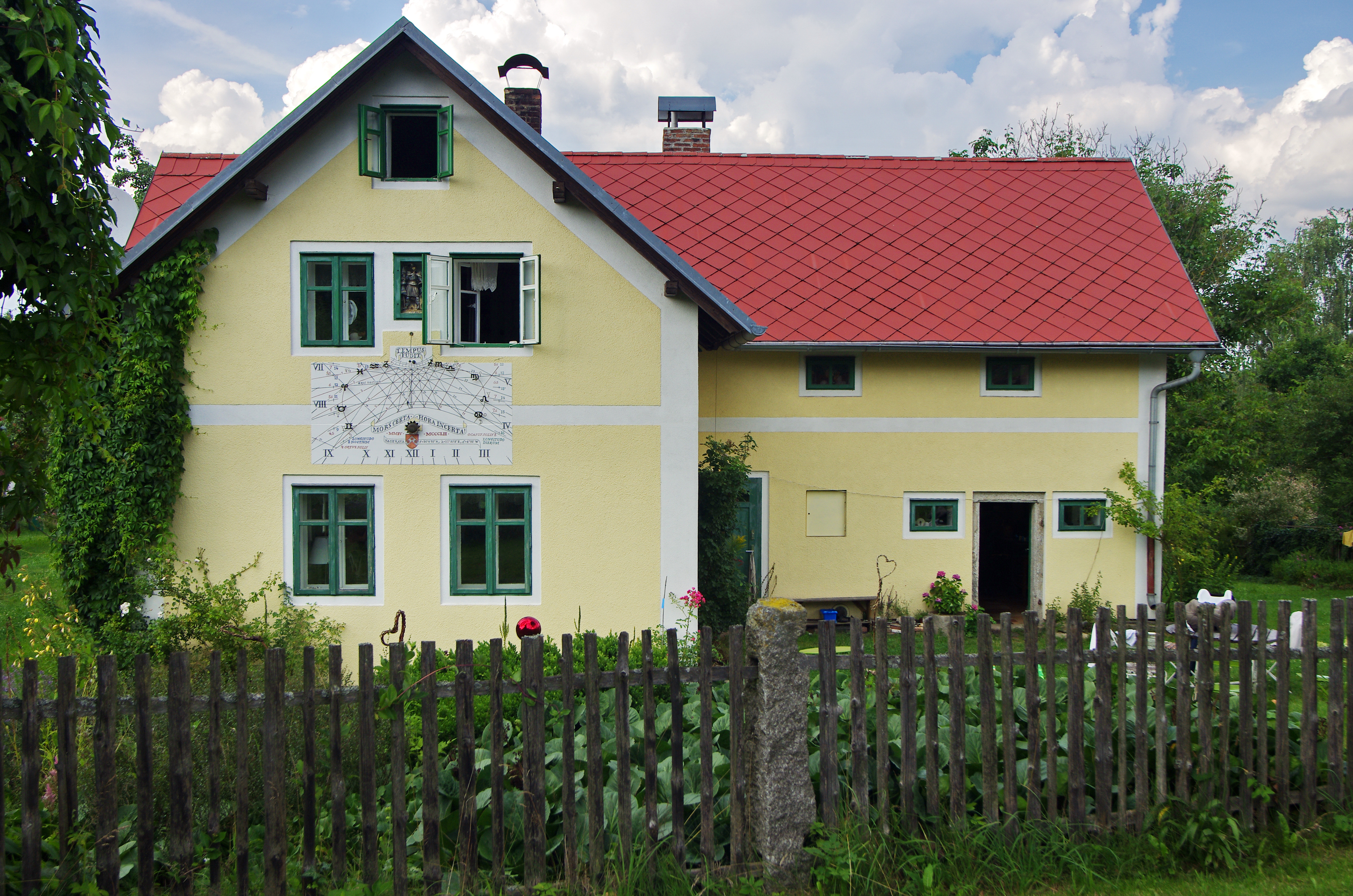 Osada Kolová, součást obce Libavské Údolí, chalupa v osadě, okres Sokolov